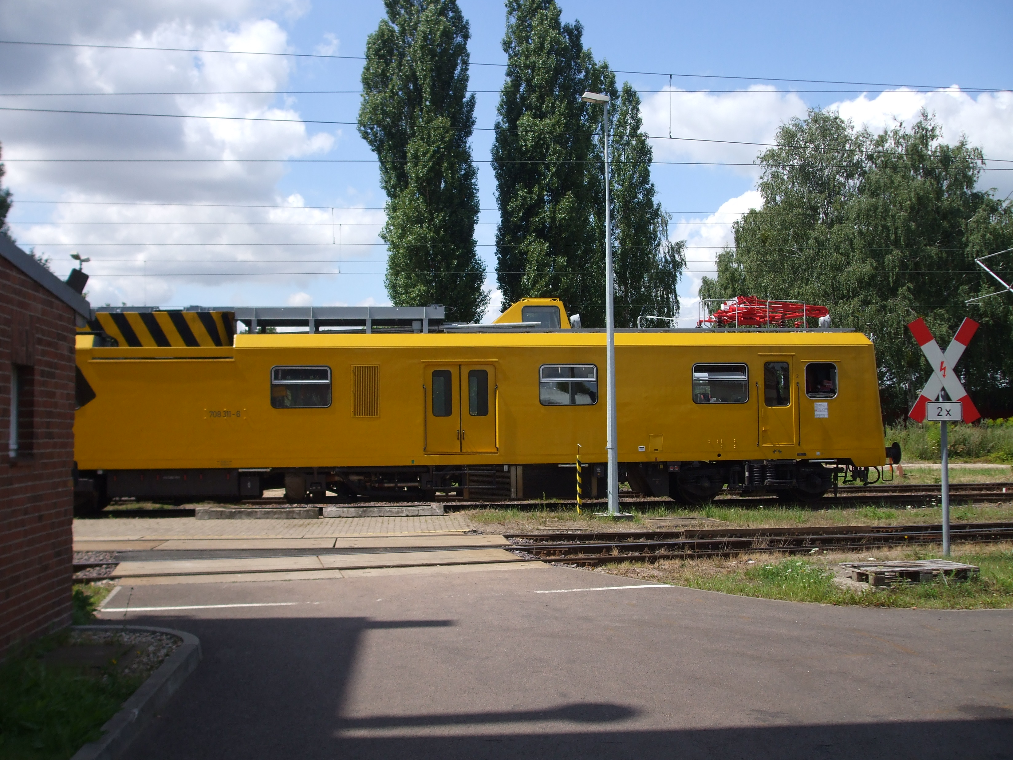 ORT 708 311 in aktueller Farbgebung